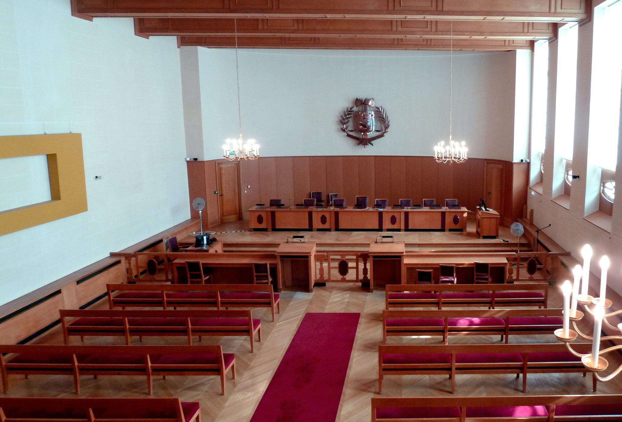 Hôtel d'Aumont (Tribunal administratif de Paris). Salle d'audience. Photo prise lors des journées du patrimoine 2011